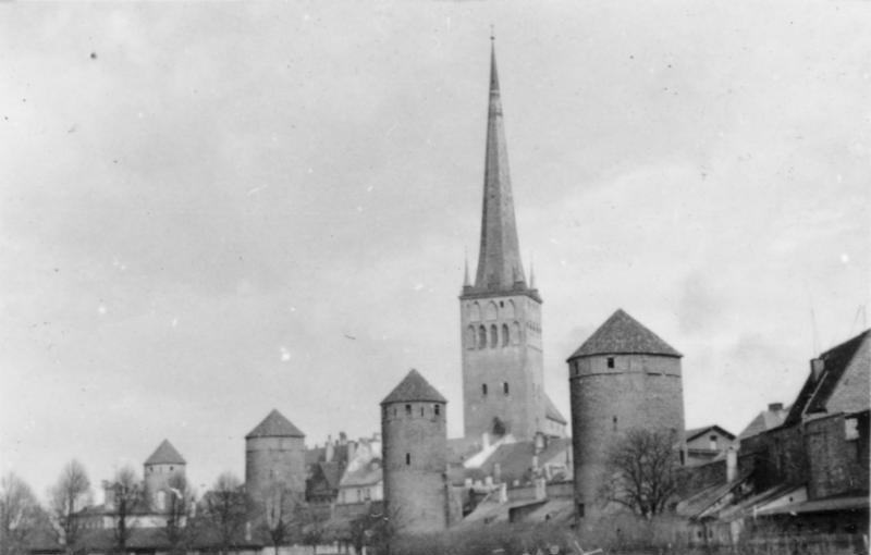 Reval, Mai 1943 Olaikirche mit Stadtmauer Einsatzstab Reichsleiter Rosenberg für die besetzten Gebiete - Hauptarbeitsgruppe Ostland Film:82/30